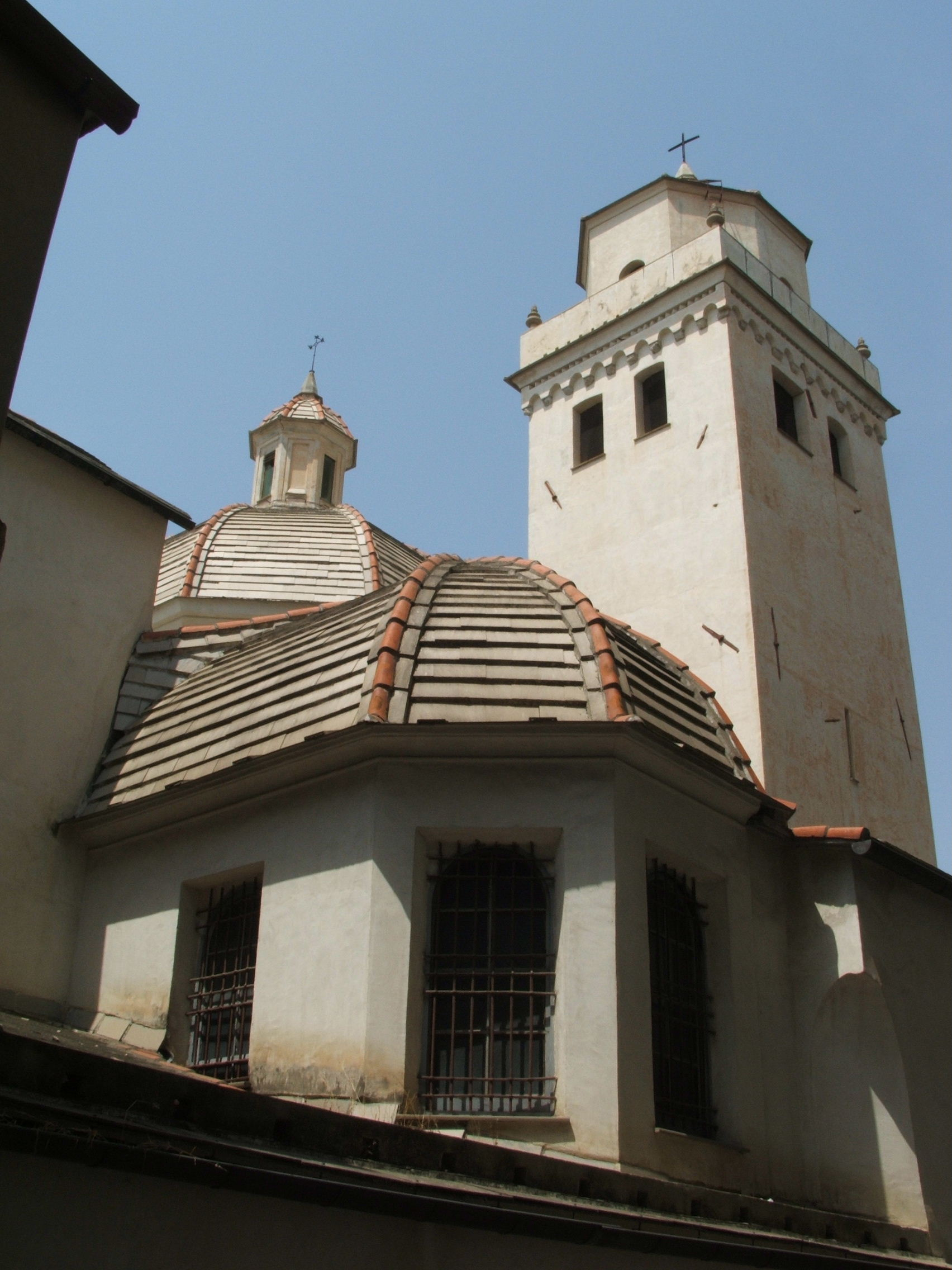 Genova Complesso di Santa Maria di Castello visto dal retro